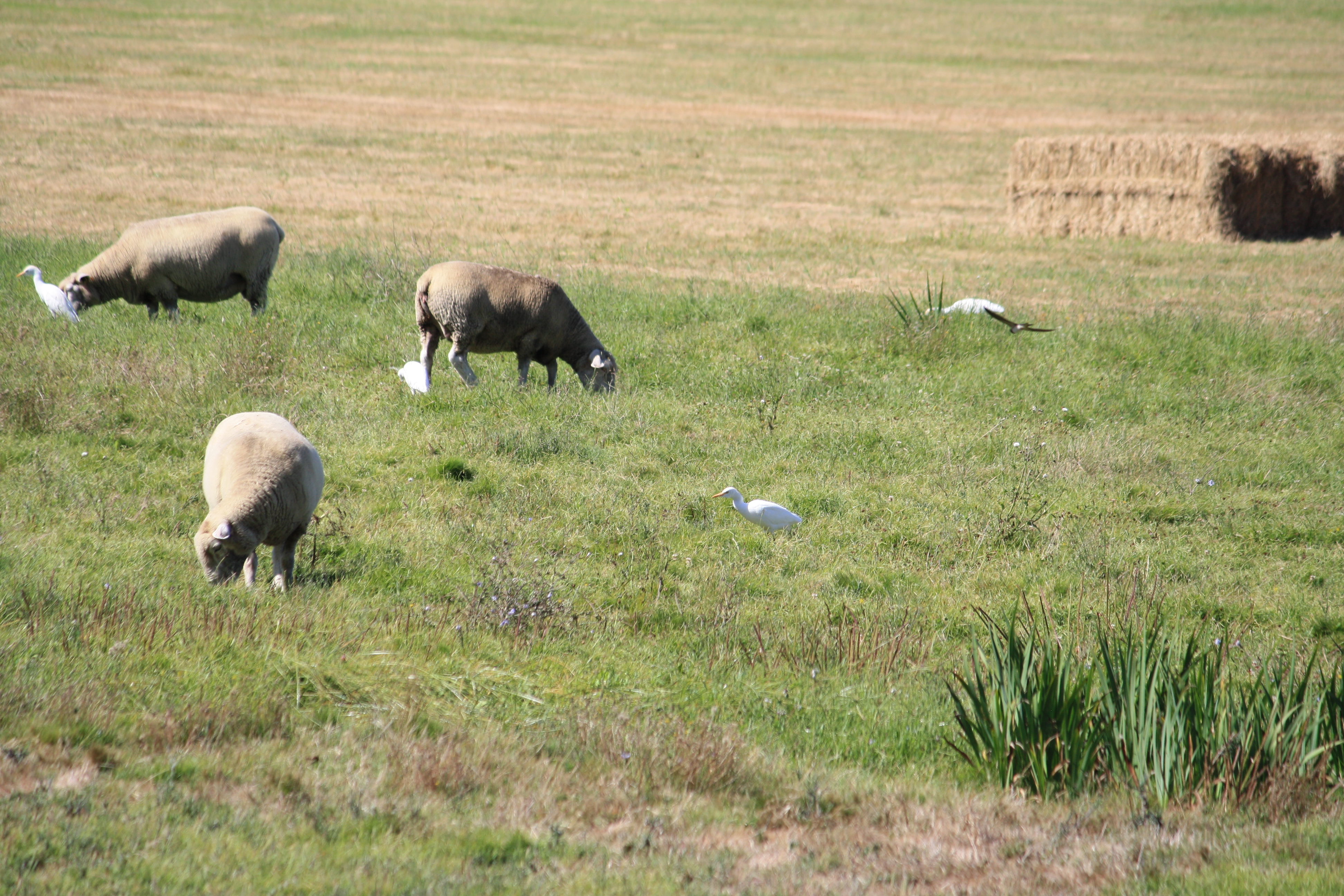 Schapen en zilverreigers